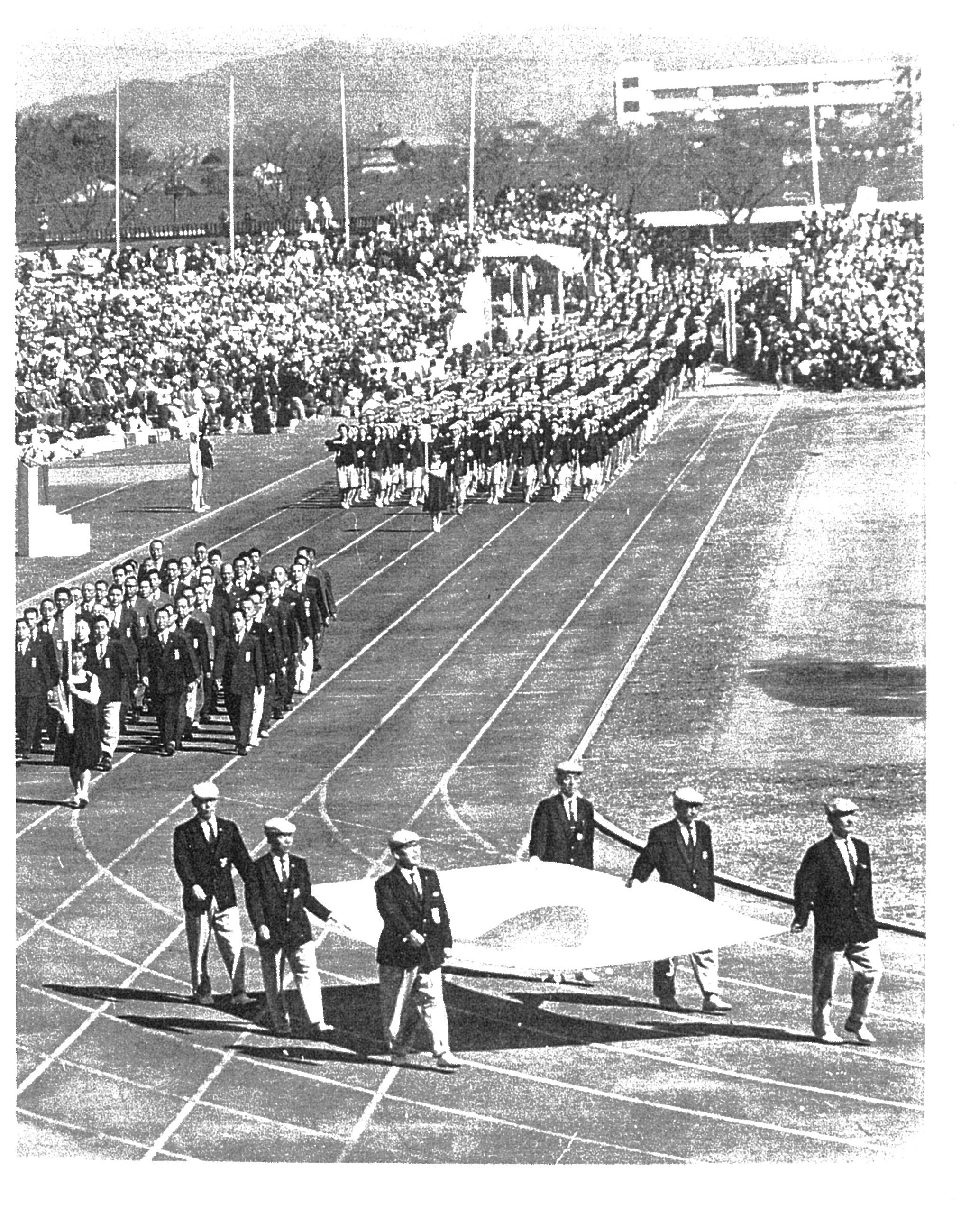 第15回国民体育大会秋季大会の開会式